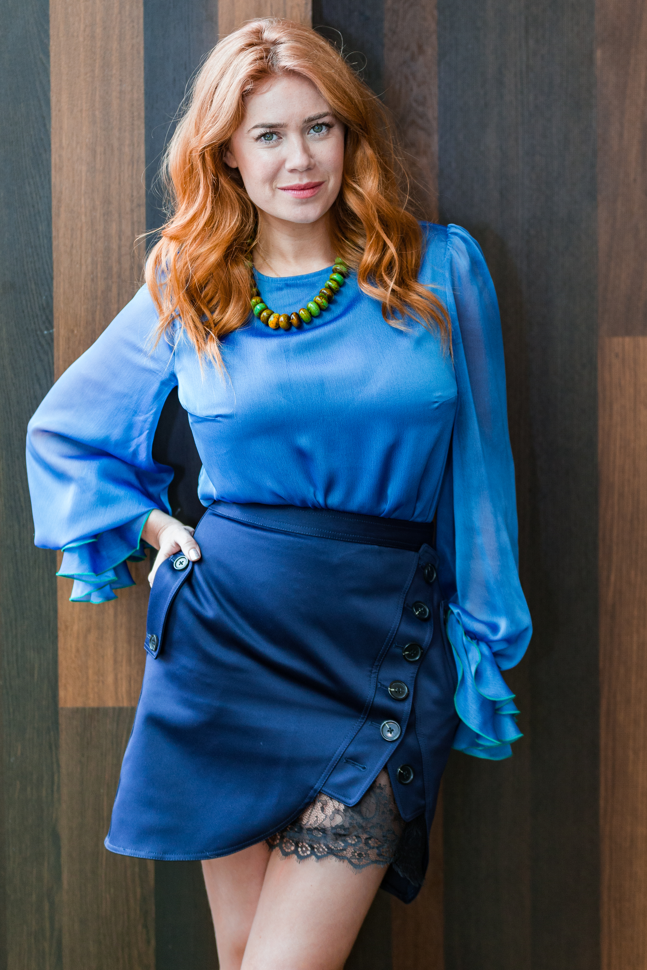 Palina Rojinski; Moderatorin und Schauspielerin; ARD-Reporterin